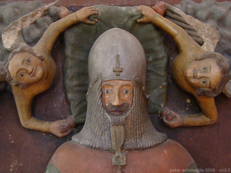 Ulrich V. Landschad von Steinach, von seinem Grabmal in der evang. Kirche in Neckarsteinach